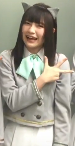 わーすたです。